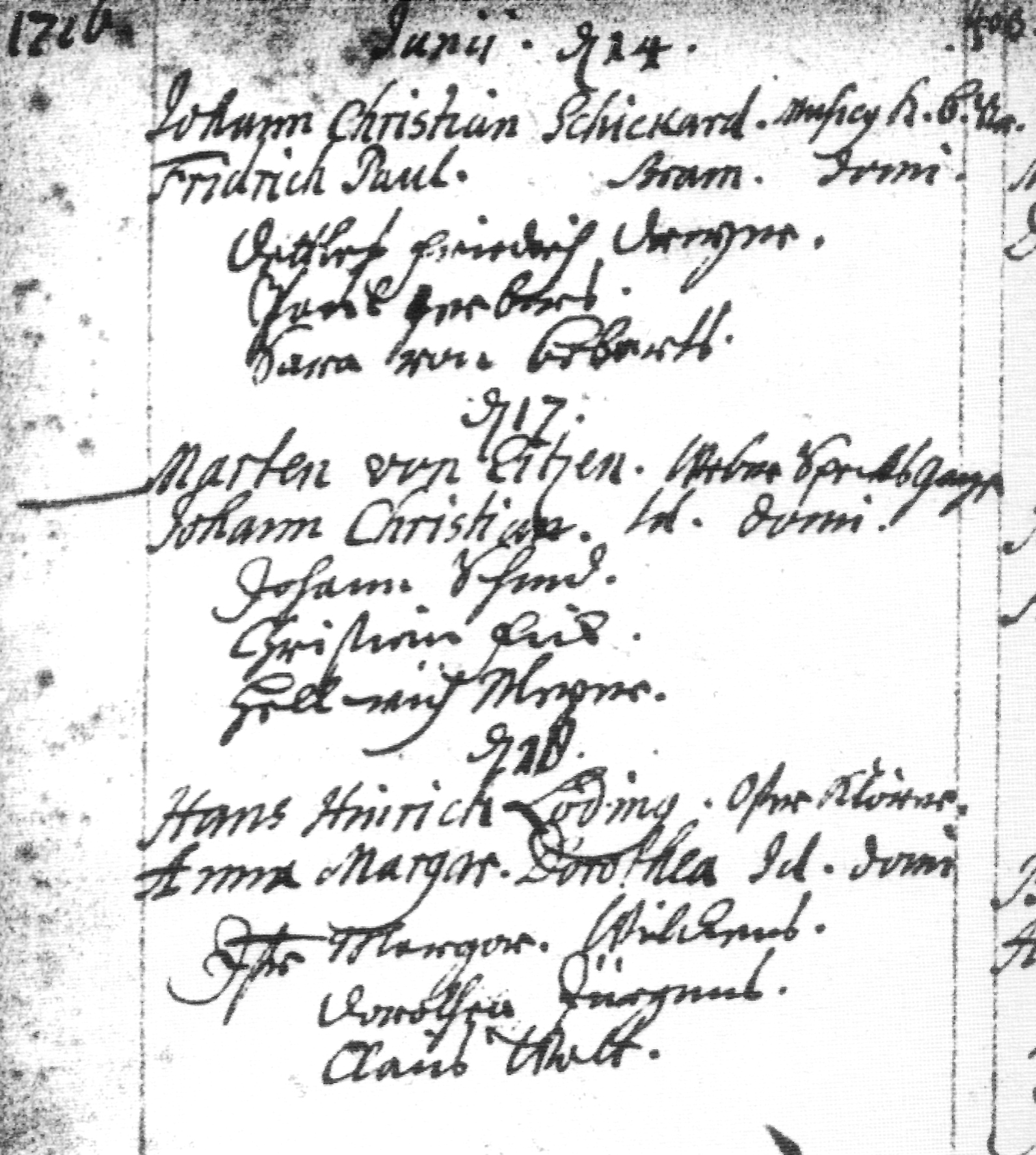 Auszug aus dem Taufbuch der Pfarrgemeinde St. Petri in Hamburg mit dem Eintrag Friedrich Paul Schickhardt, eines Sohnes von Johann Christian Schickhardt